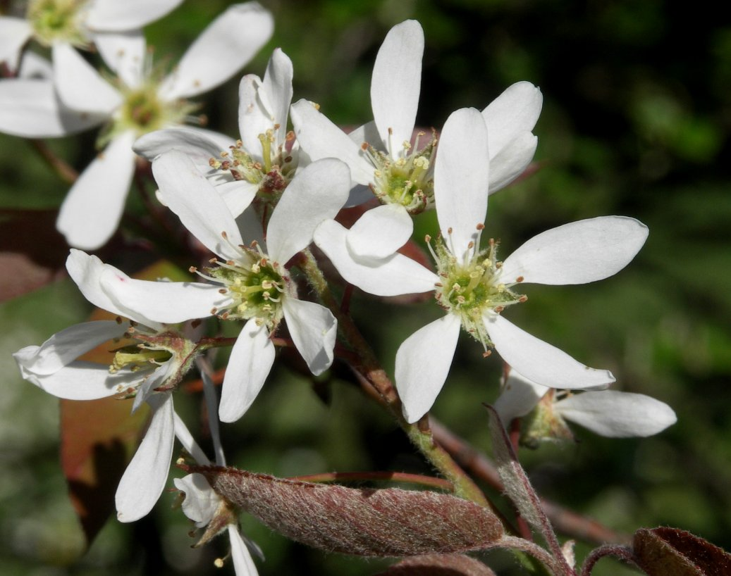 Flowers of Amelanchier lamarckii, Oldenburg, Germany